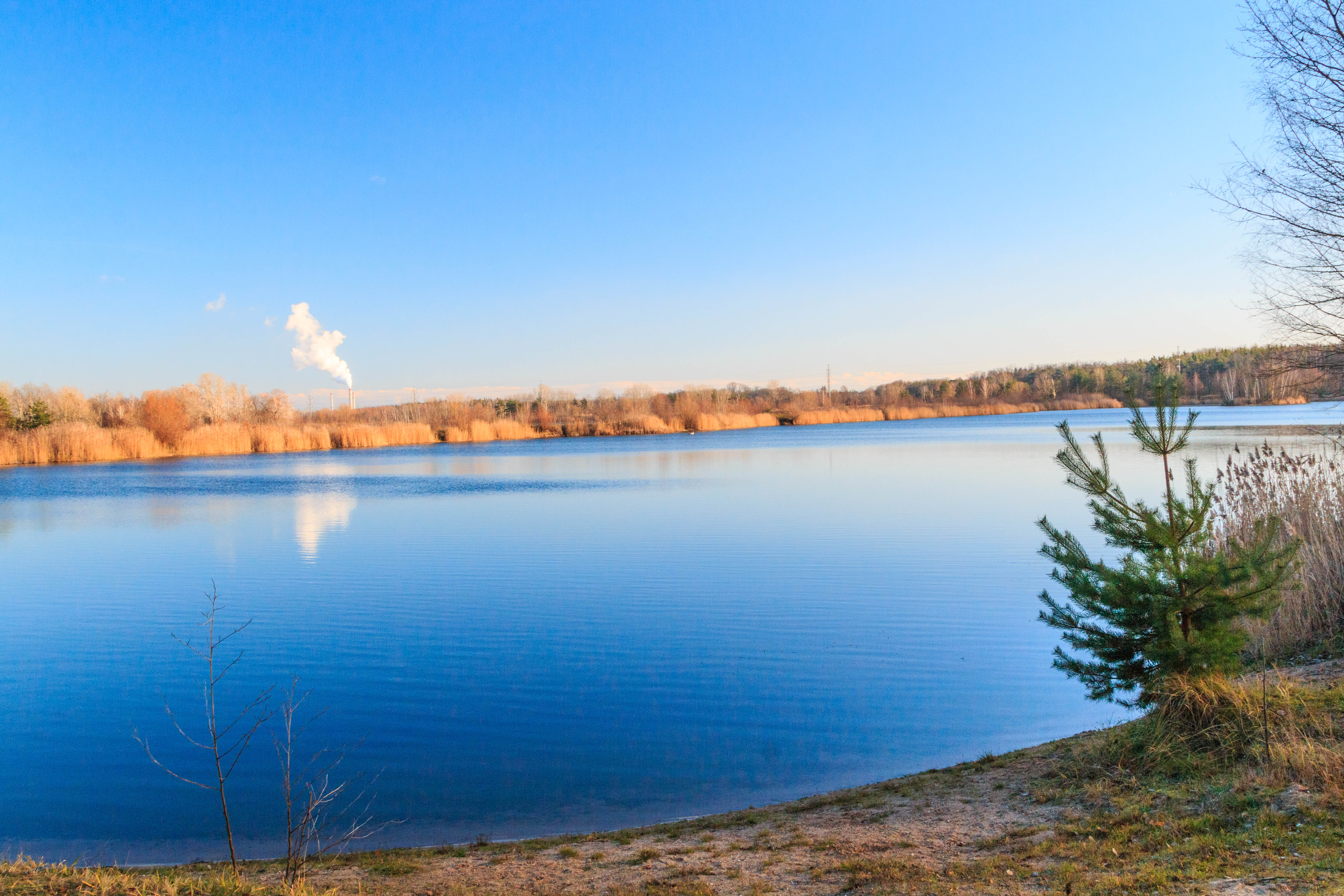 Písník Hrádek Project: Vodstvo.